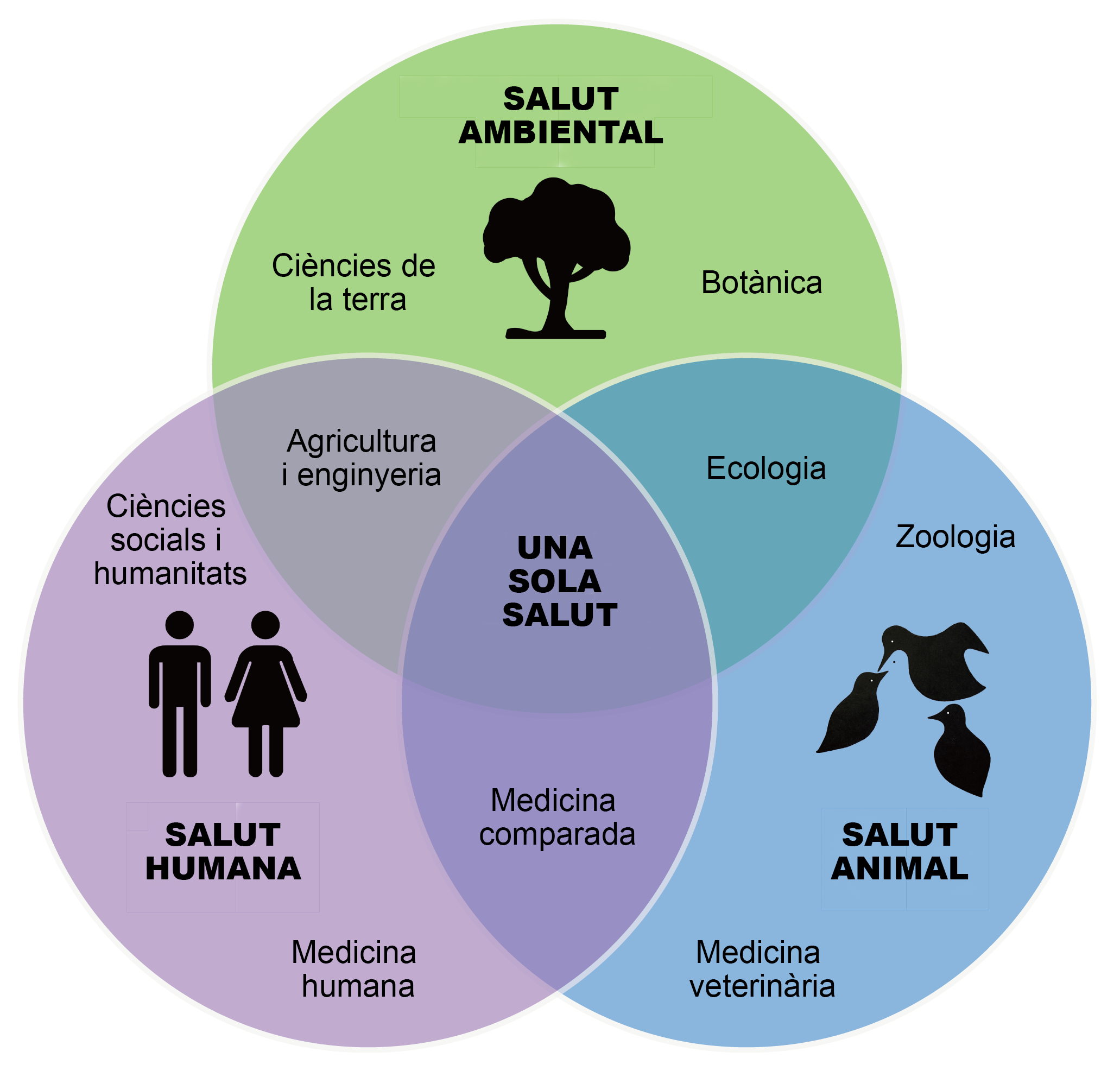 Tríada Una sola salut - Versió en català - Adaptació de la versió anglesa